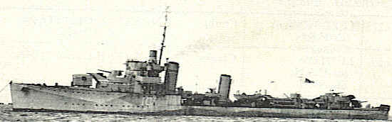 HMS Montrose mit 6 pdr-Zwillingsturm als Buggeschütz